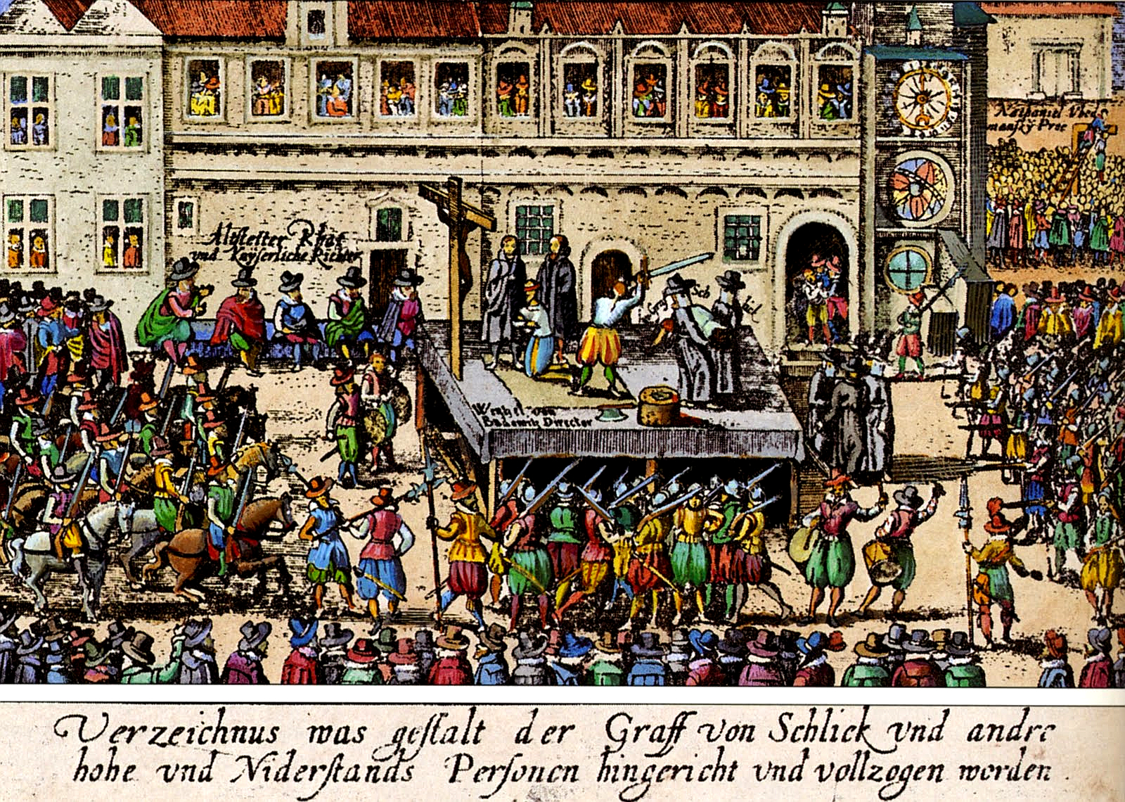 Hinrichtung der böhmischen Rebellen auf dem Prager Altstädter Ring 1621, zeitgenössischer Holzschnitt